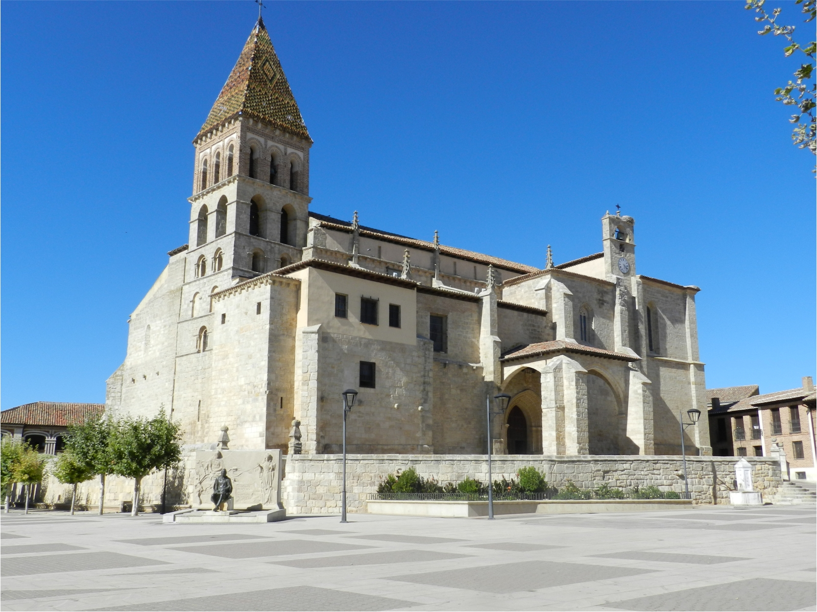 Imagen exterior del Templo y de la Torre